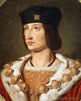 Portrait de Charles VIII de France (1470-1498)